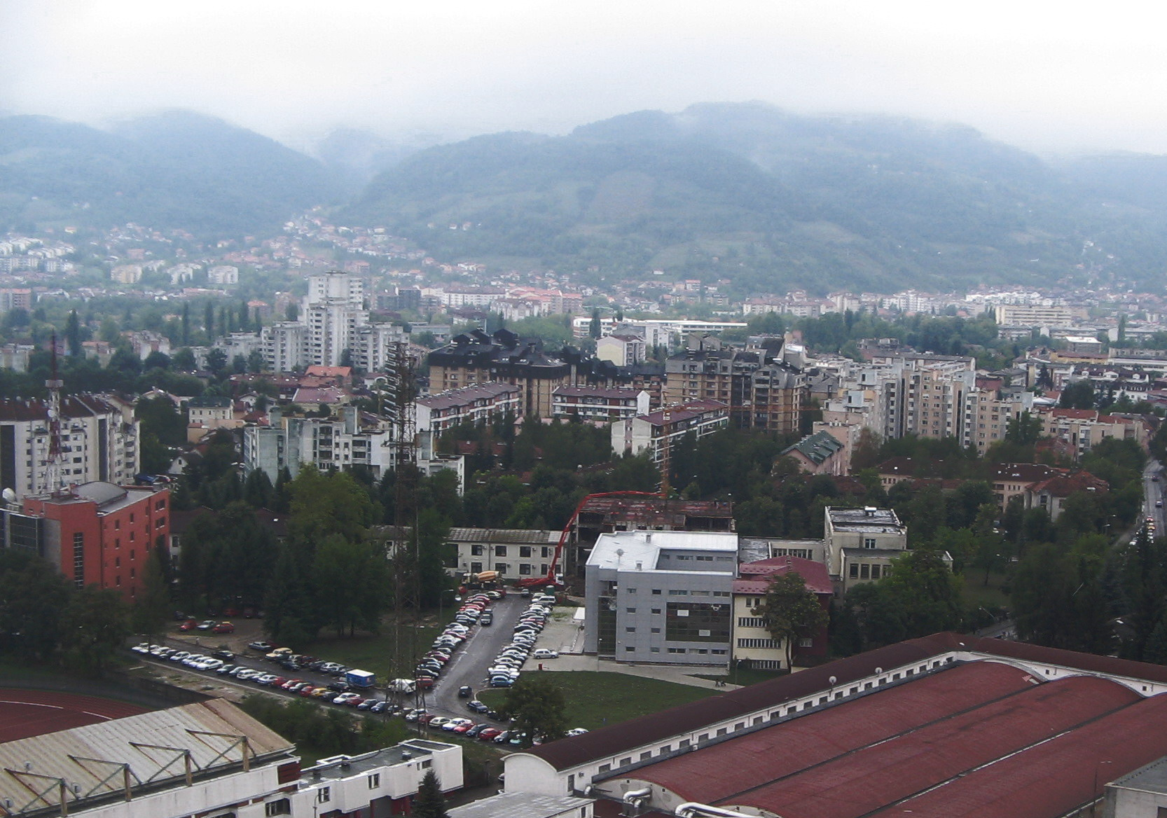 Поглед на дијелове бањалучких насеља Борик (лијево) и Центар (десно) са административног центара Владе Републике Српске.